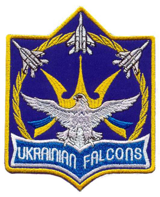 Нашивка національної пілотажної групи "Українські Соколи"